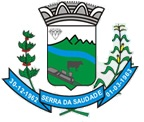 Brasão do município de Serra da Saudade, MG, BRasil.